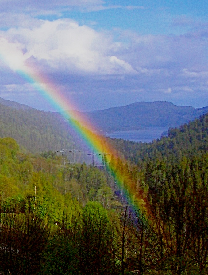 Kivledalen in Seljord Norway